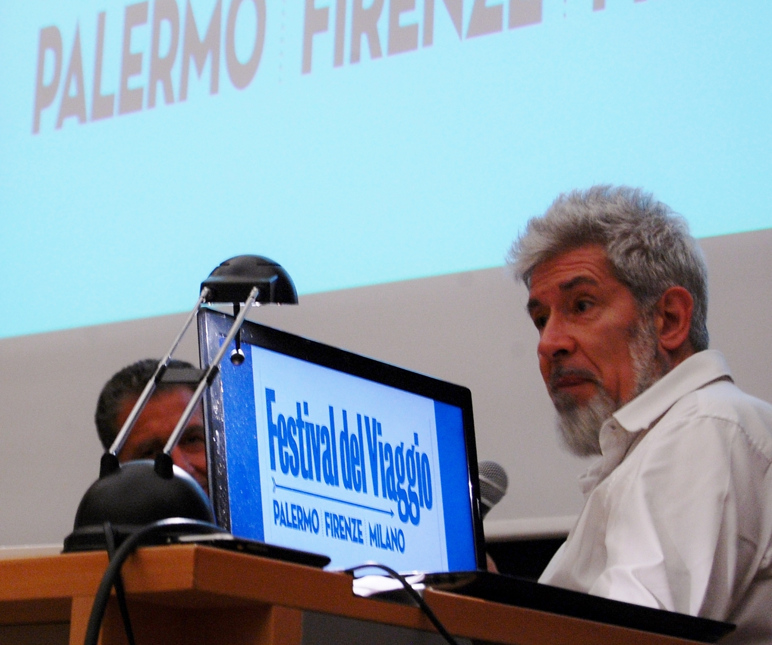 Il regista e attore di cinema e teatro Alessandro Benvenuti ha partecipato nel 2013 alla conferenza "Il viaggio diversamente abile". Foto scattata presso il Museo Antropologico di Firenze nel giugno 2013.